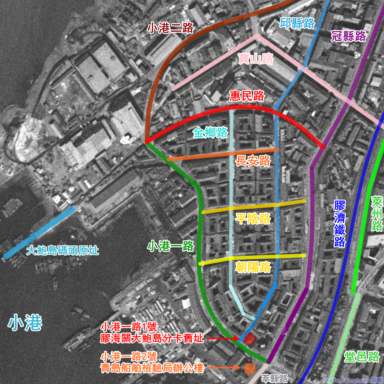 青島海關後及周邊衛星影像圖解，美國KH-7衛星所攝